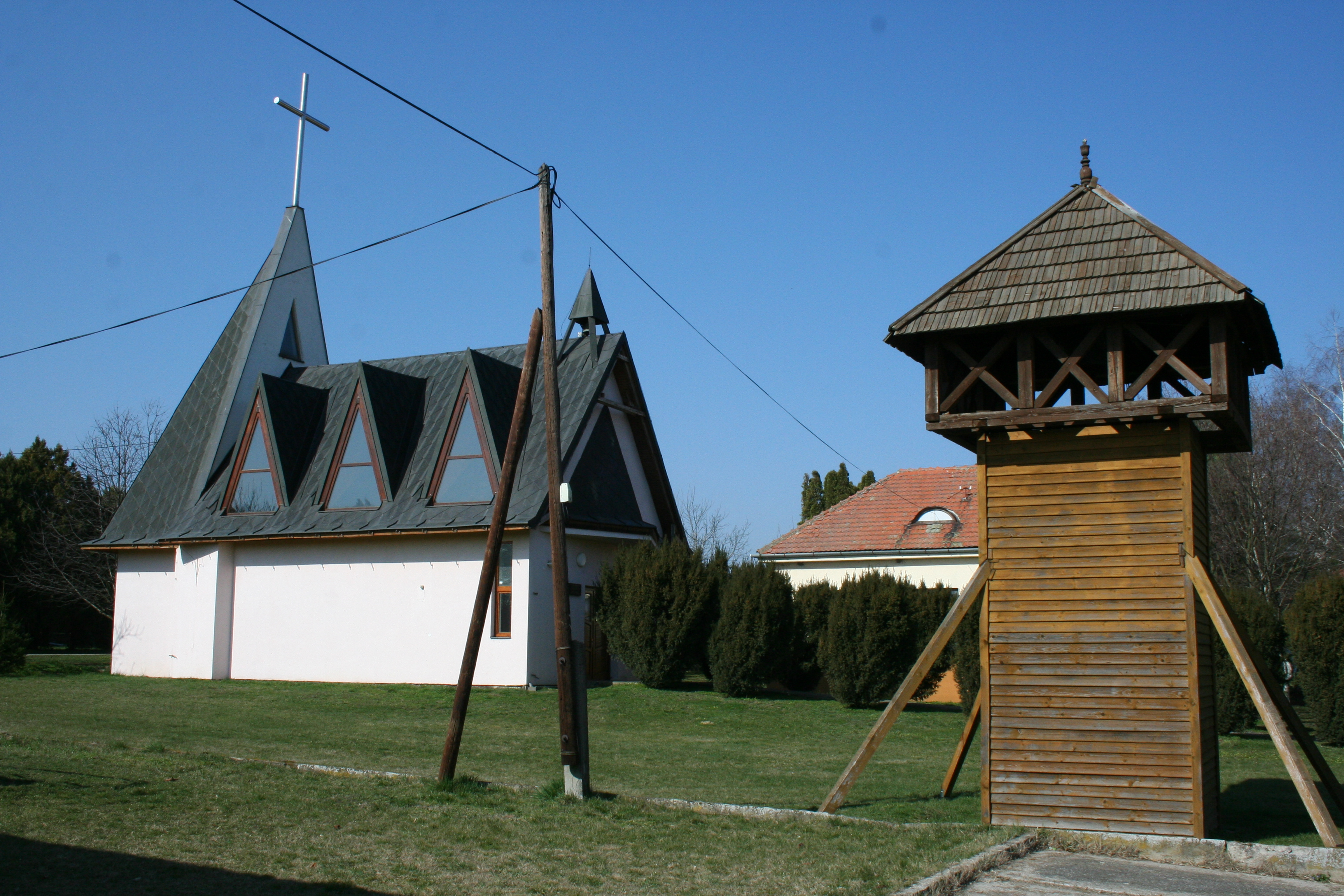 Újpuszta